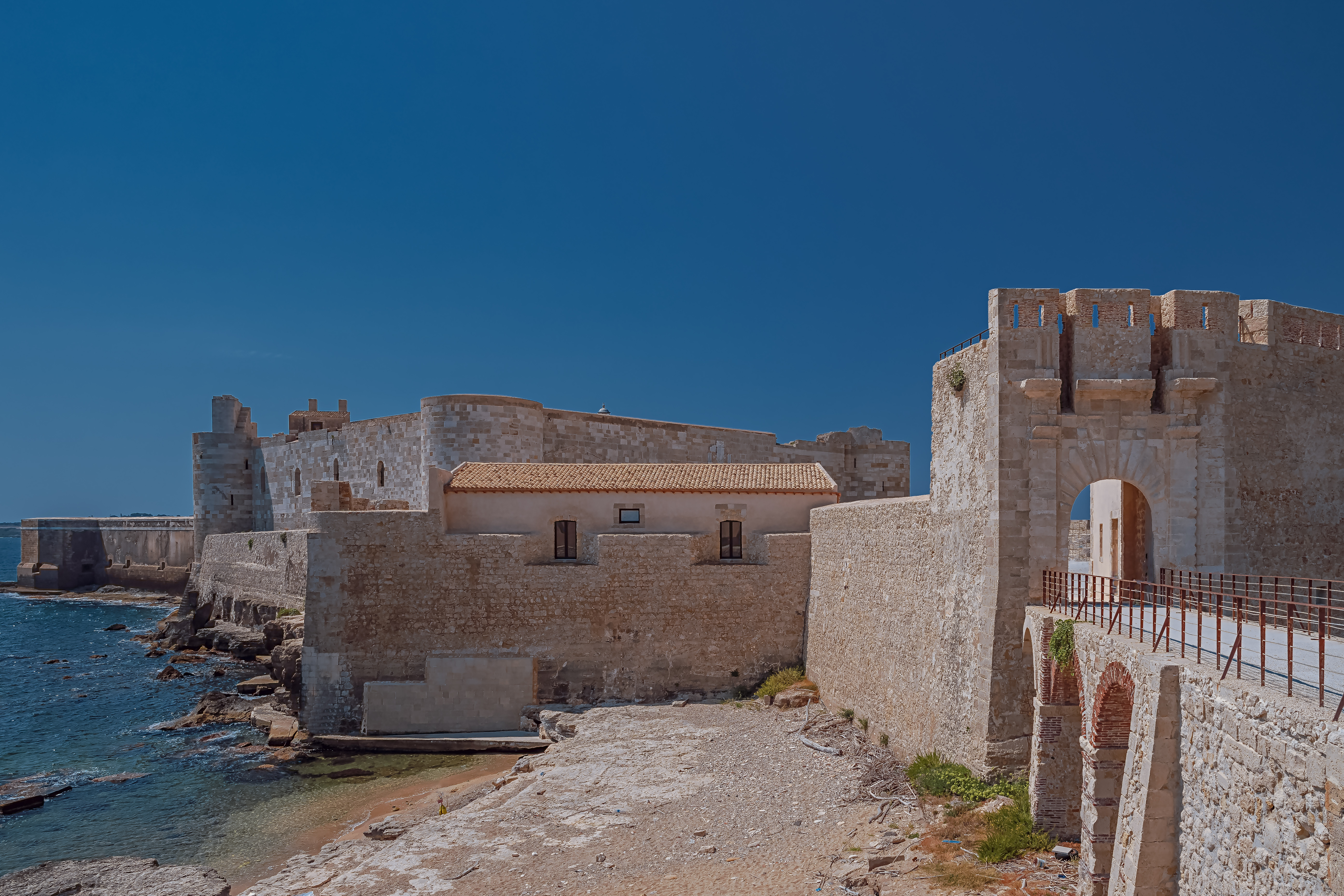 Eingang zum Castello Maniace auf der Halbinsel Ortygia in Syrakus